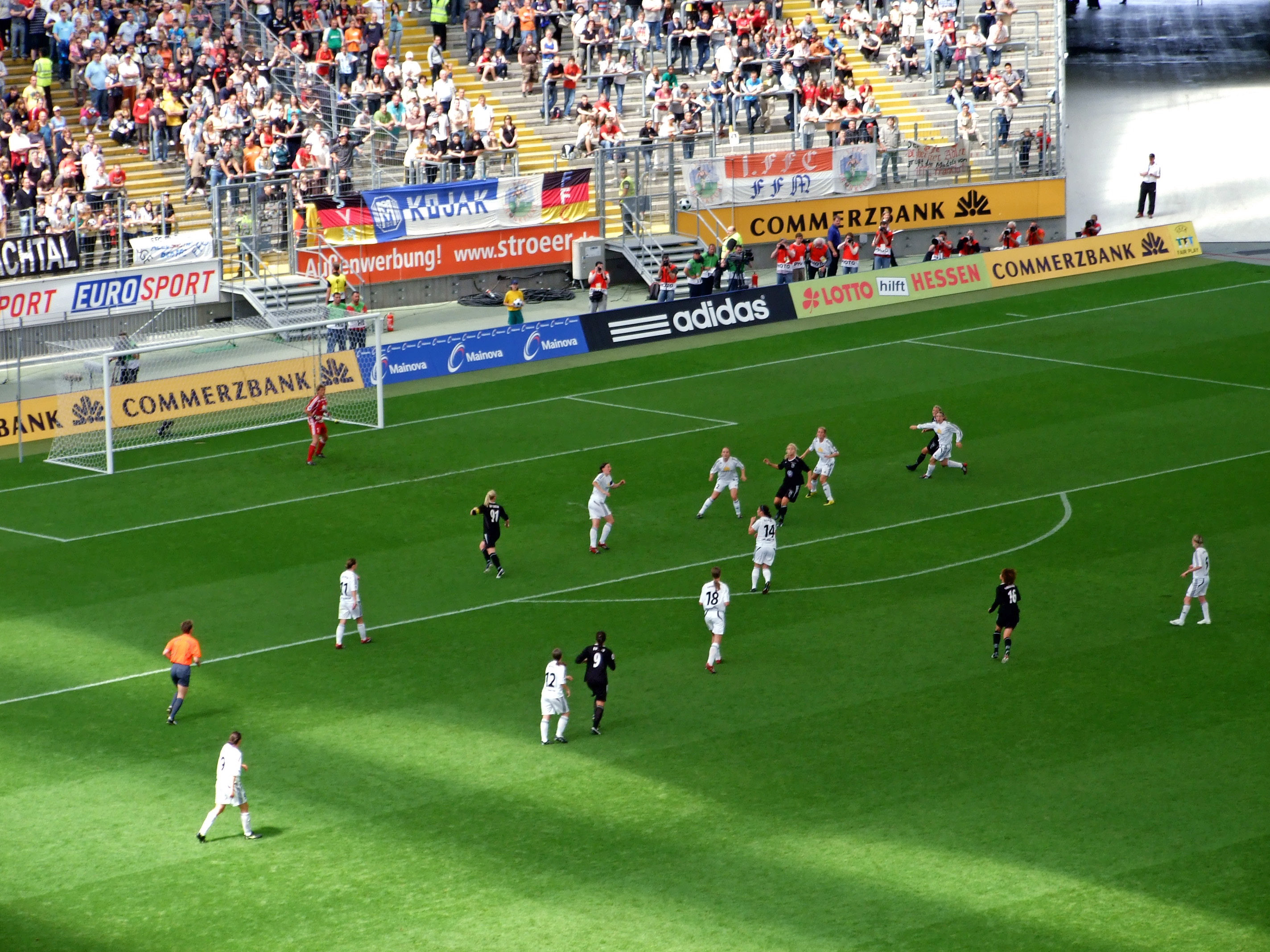 1. Halbzeit, Angriff von Umeå gegen den 1. FFC, Commerzbank-Arena bei dem UEFA-Women's-Cup 2007/2008, Finalrückspiel zwischen 1. FFC Frankfurt und Umeå IK damfotboll